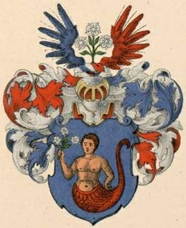 Numersi suguvõsa aadlivapp